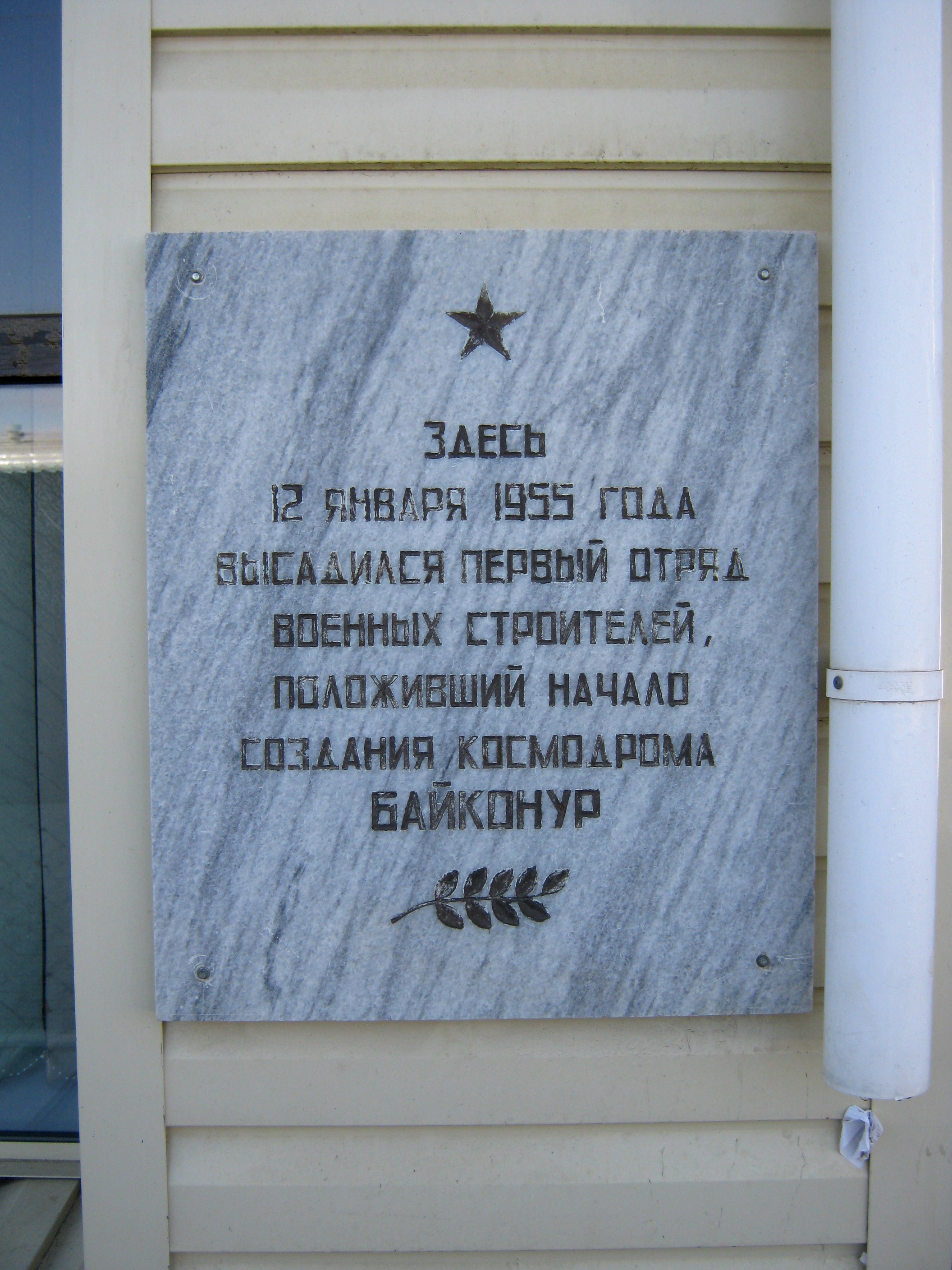 Мемориальная доска на станции Торетам